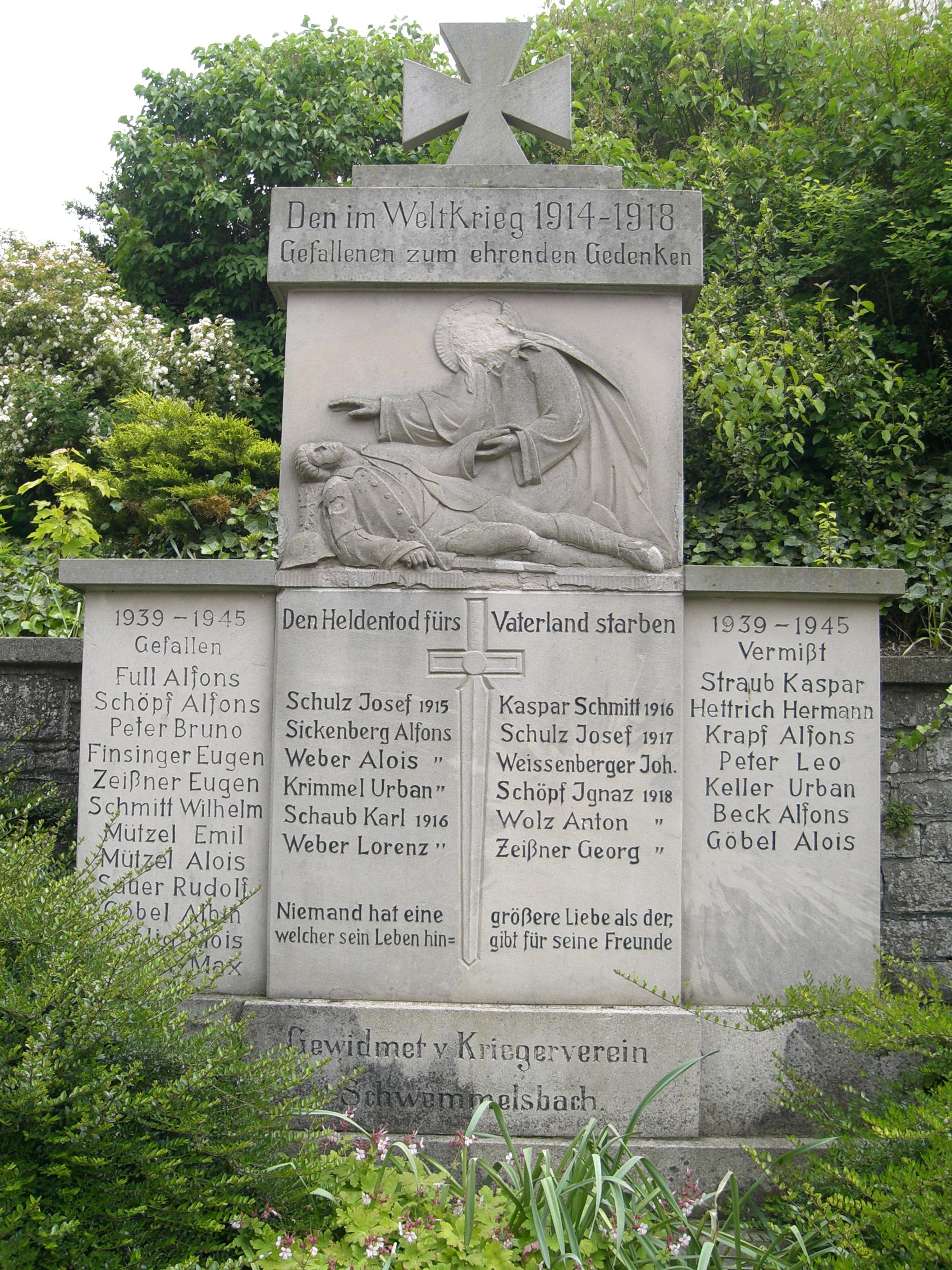 Kriegerdenkmal in Schwemmelsbach, 1. und 2. Weltkrieg